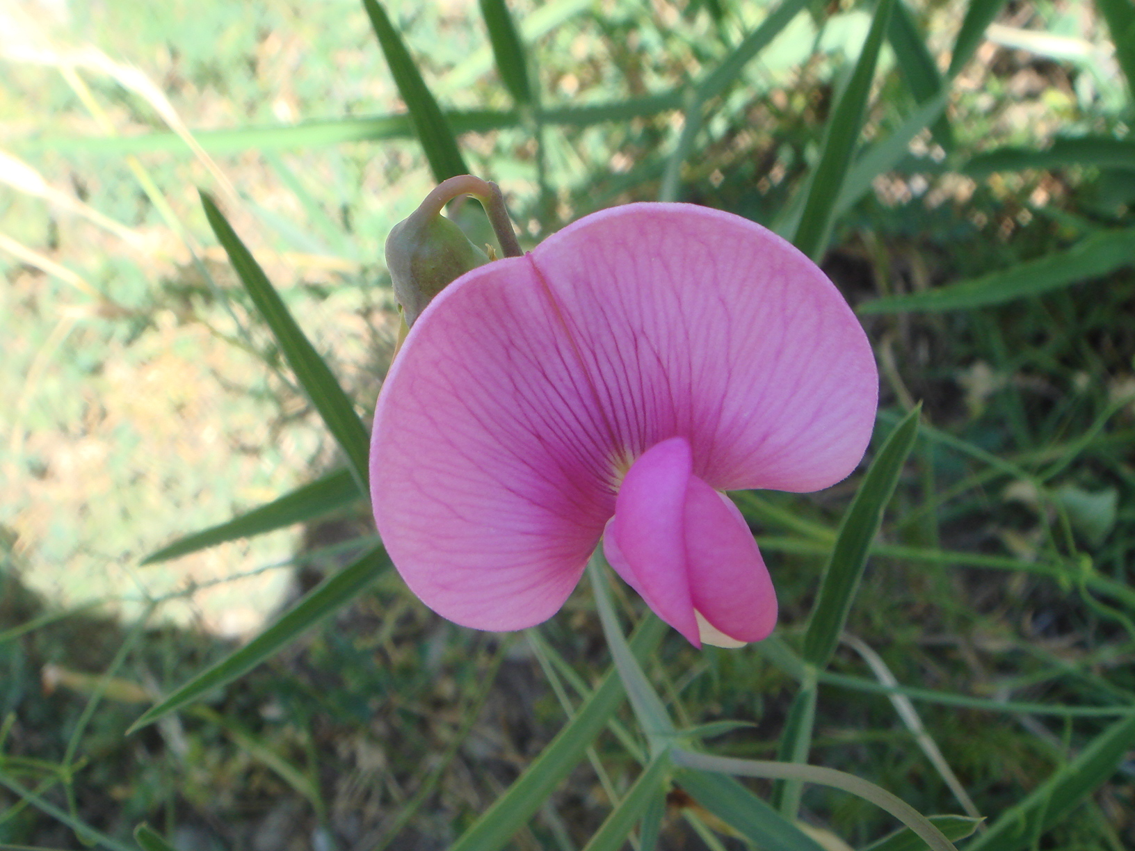 Lathyrus sylvestris, Tella, Pirineos, (Huesca), España.